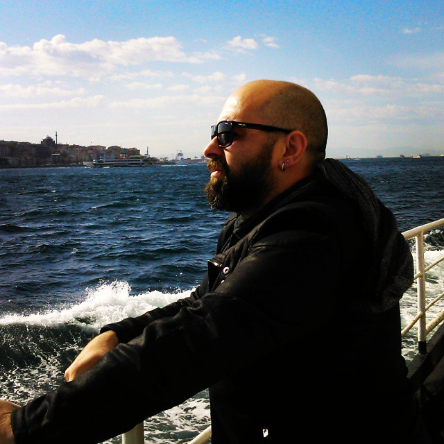 Adem Karaduman 2015